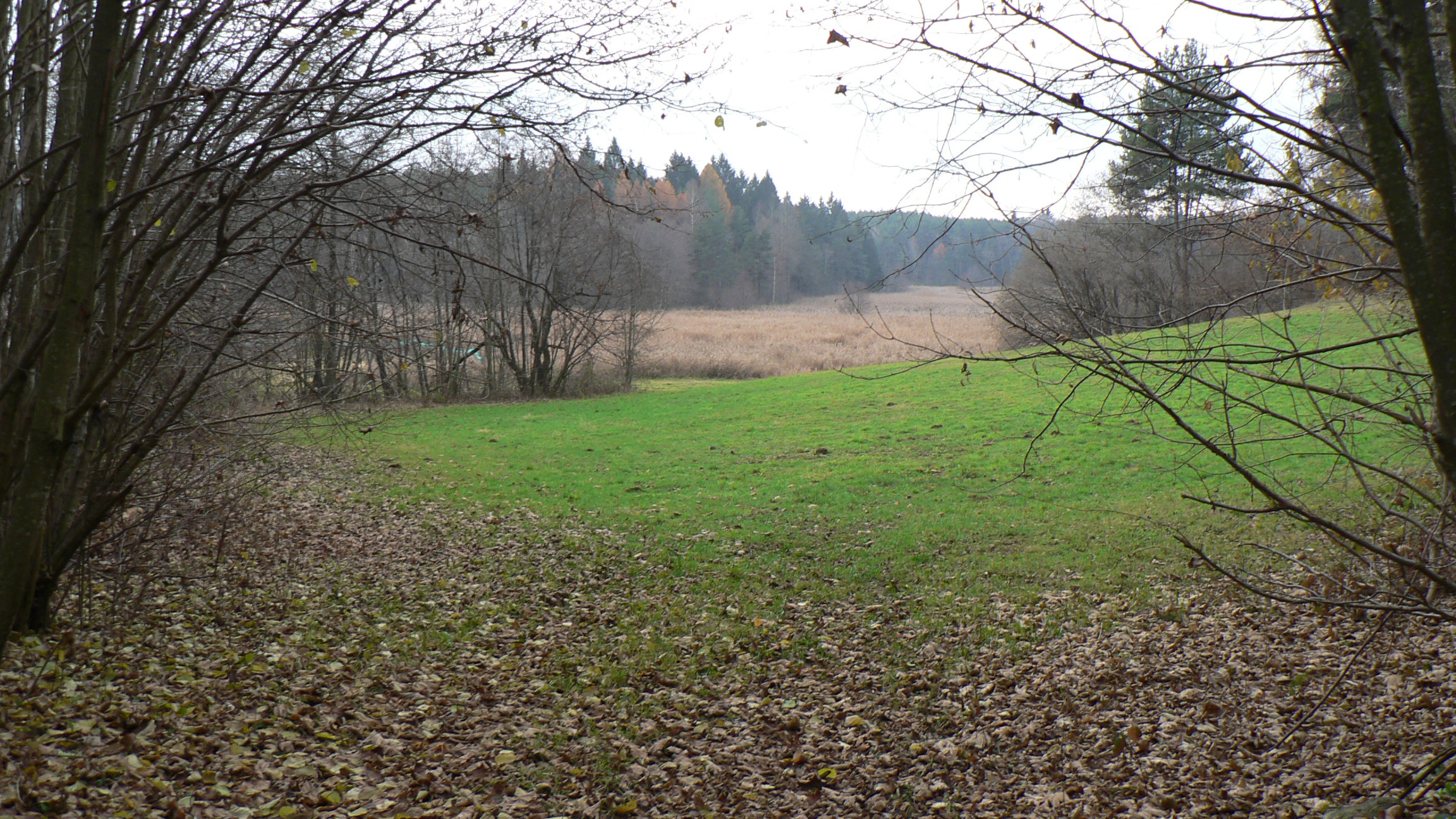 Biotopo Laghestel di Piné (Q3825549)